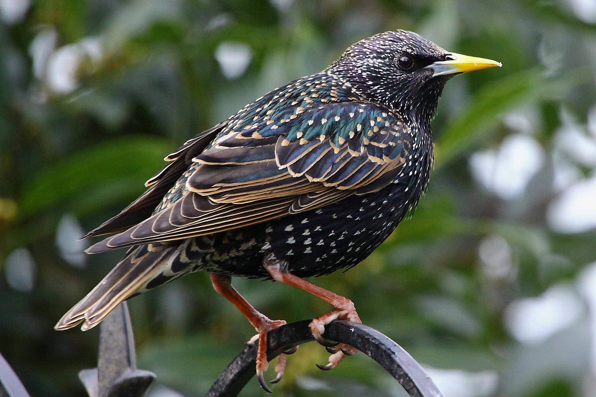 Starling